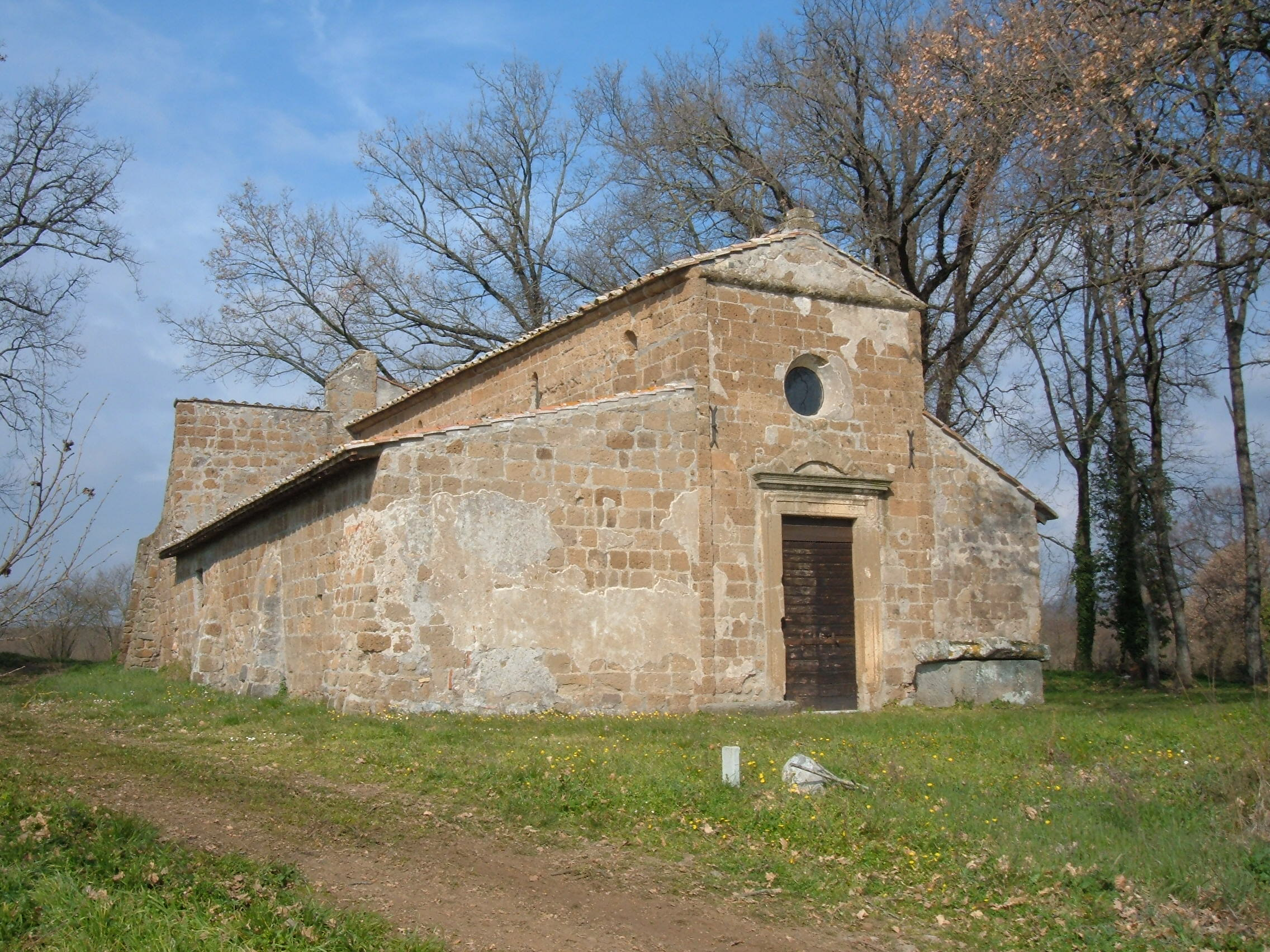 Chiesa di Sant'Eusebio a Ronciglione (VT), dell'VIII-IX secolo.